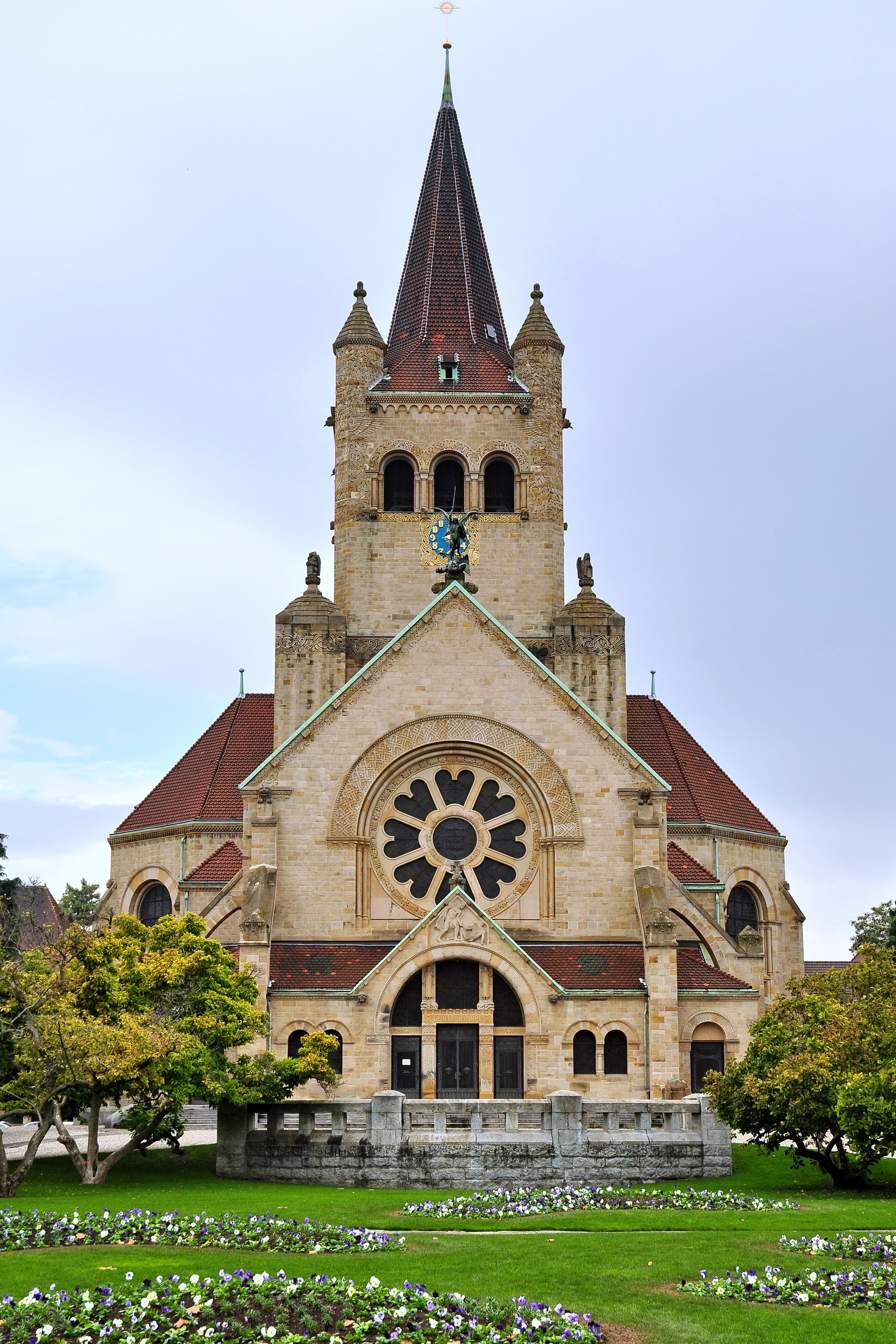 Pauluskirche in Basel (Switzerland)